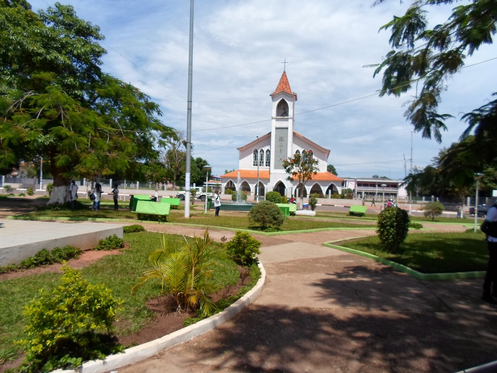 Igreja catolica em saurimo no jardim cívico